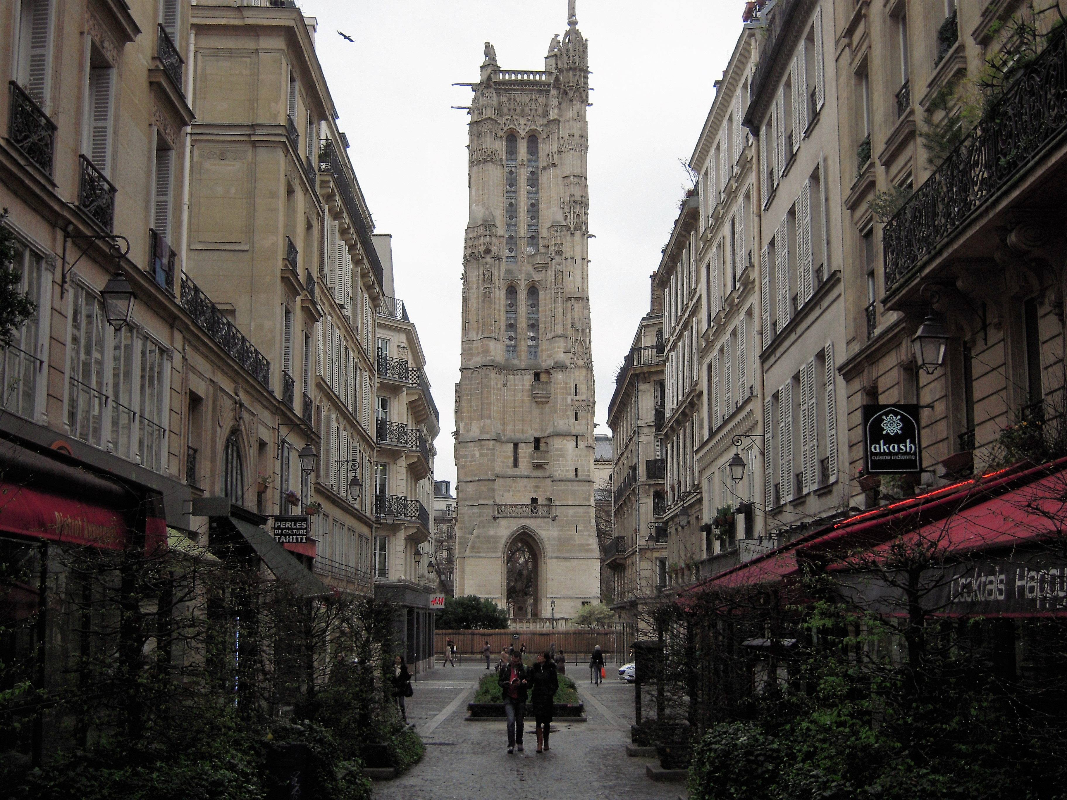 Elle porte le nom de Nicolas Flamel, bourgeois parisien du XIVe siècle, écrivain public et copiste.